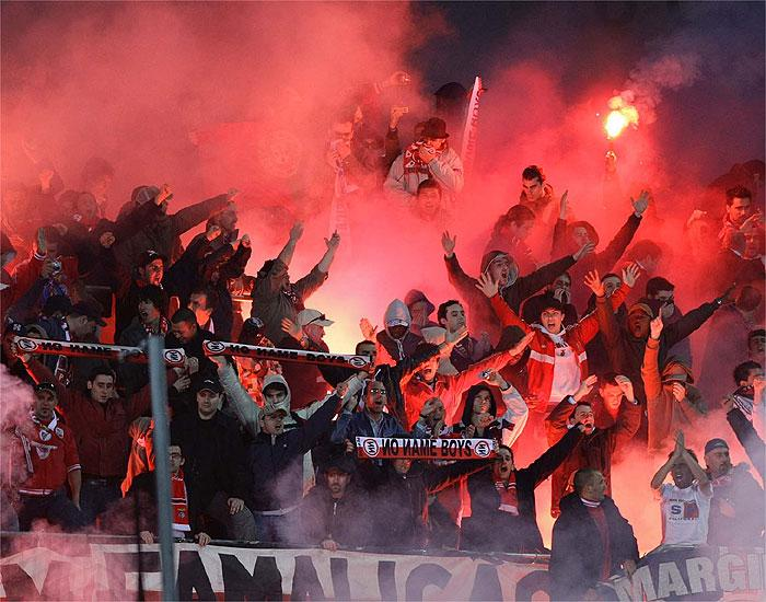 Foto da claque no jogo vs Getafe